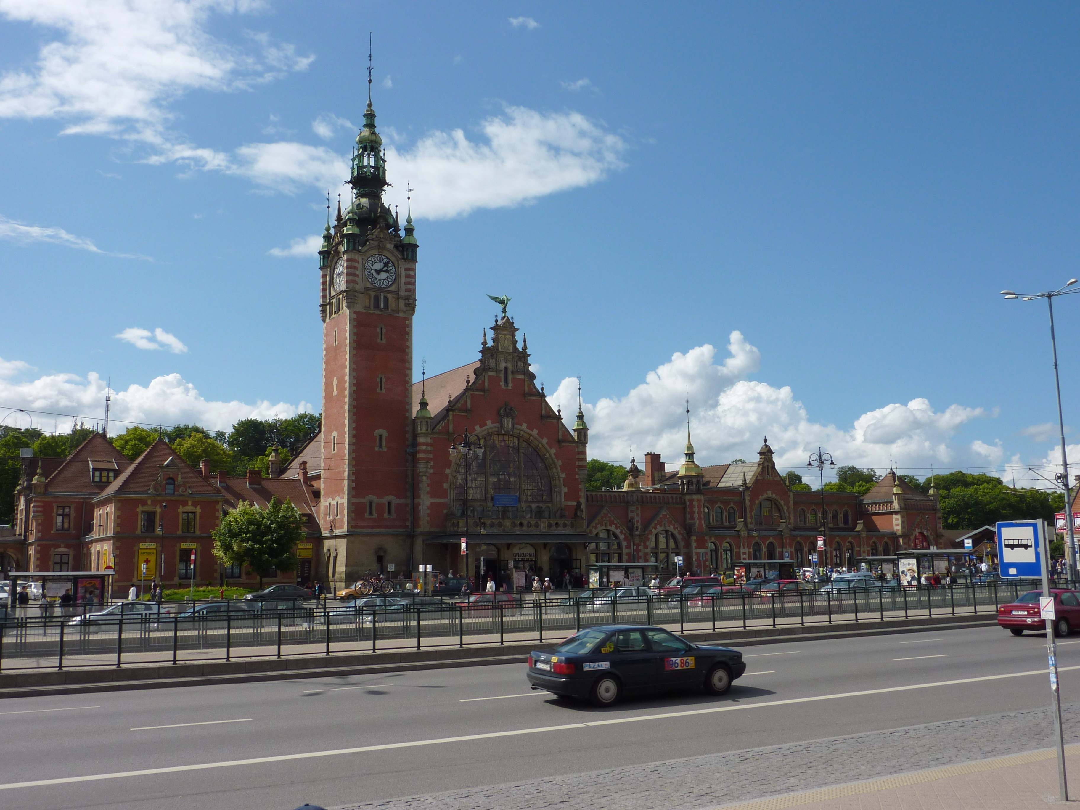 Dworzec PKP Gdańsk Główny.